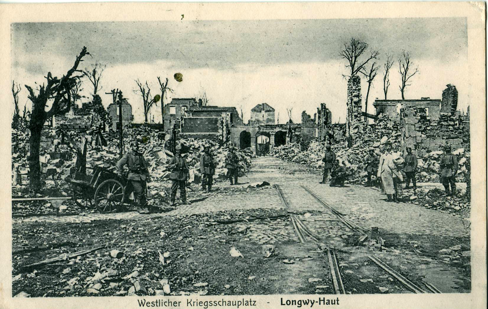 Carte postale ancienne éditée par Engelà Diedenhofen et Hayingen :LONGWY-HAUT - Westlicher Kriegsschauplatz